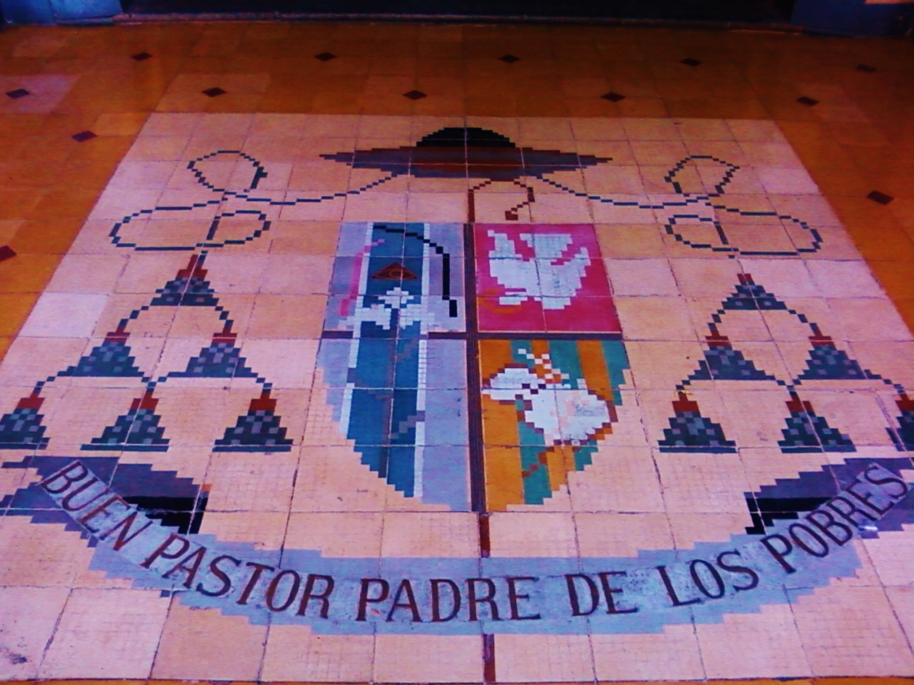 Escudo episcopal del Excmo. Monseñor Manuel Camilo Vial Risopatrón.